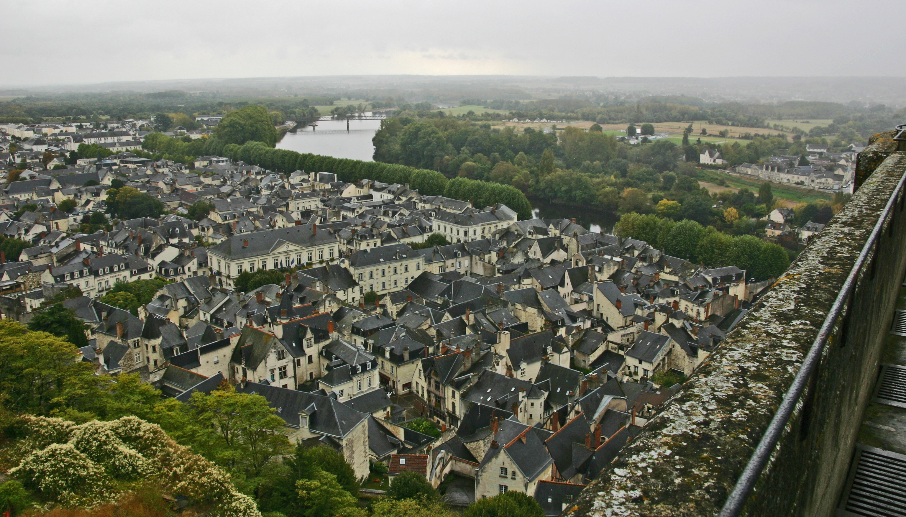 Chinon